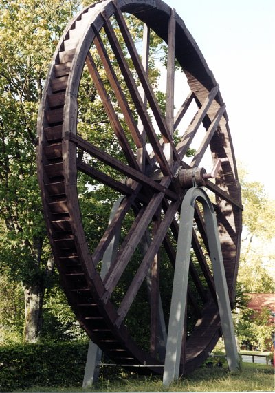 Rekonstruktion eines Kunstrades in Clausthal-Zellerfeld (Gelände der Harzwasserwerke)